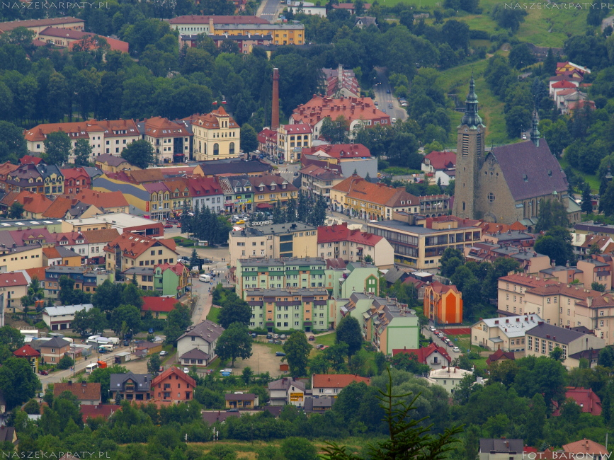 Centrum Limanowej